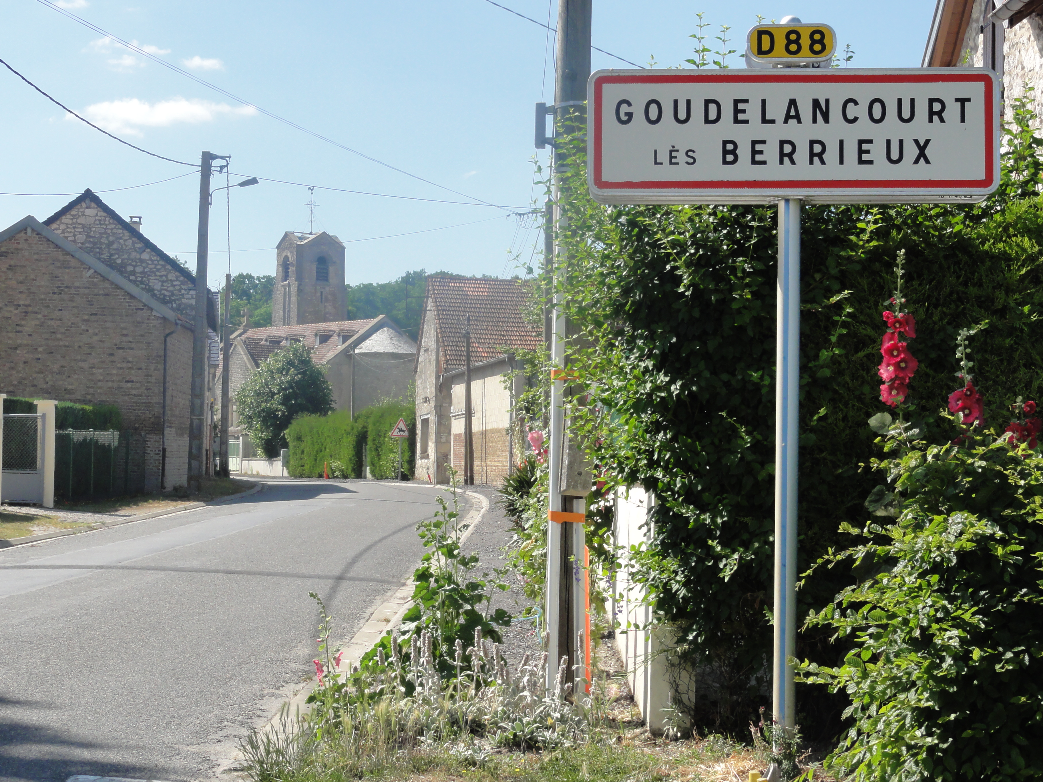 Goudelancourt-lès-Berrieux (Aisne) city limit sign